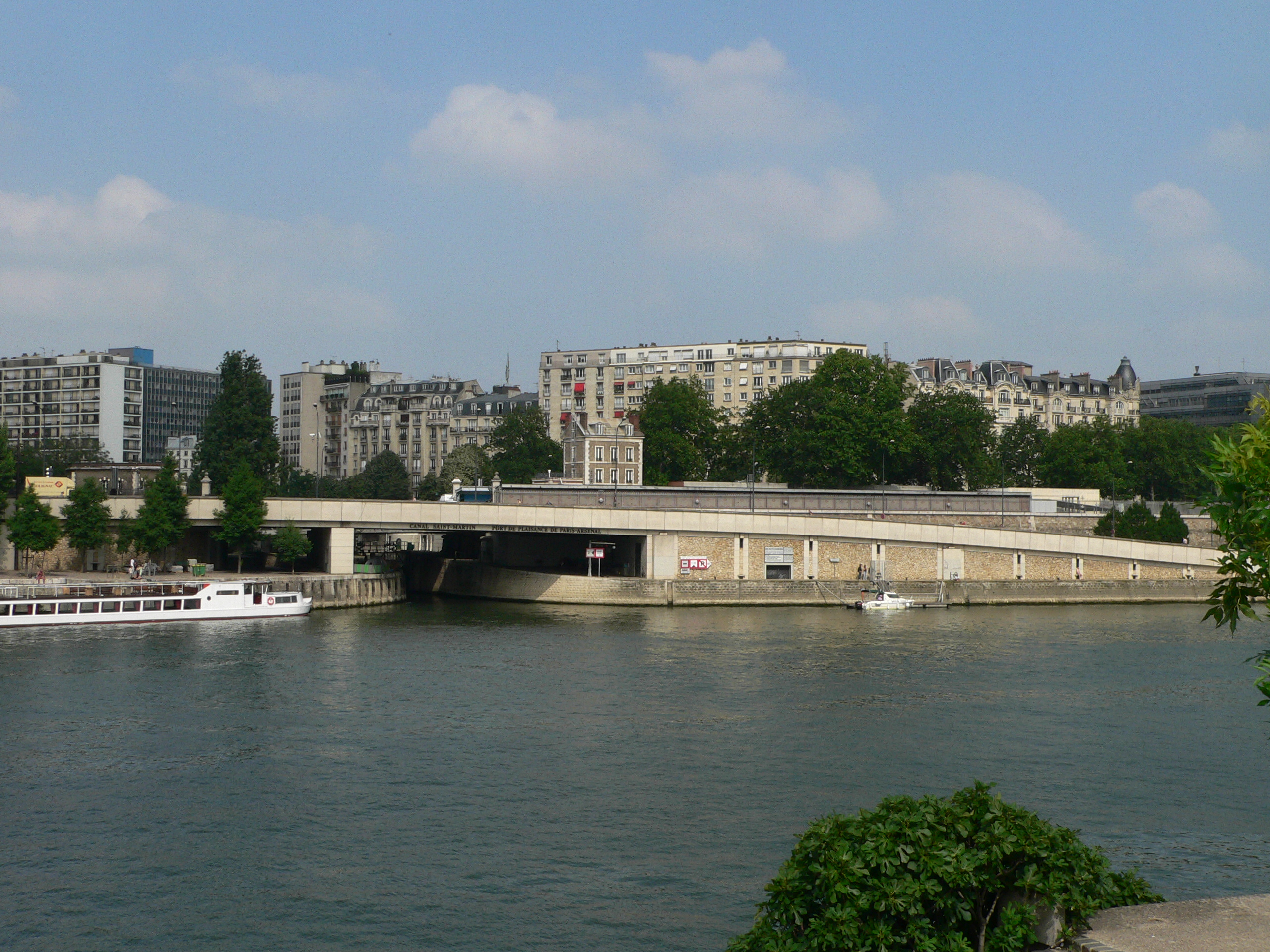 Paris: Station Quai de la Rapée (métro ligne 5), en travers de l'entrée du port de Paris-Arsenal, vue de l'autre côté de la Seine